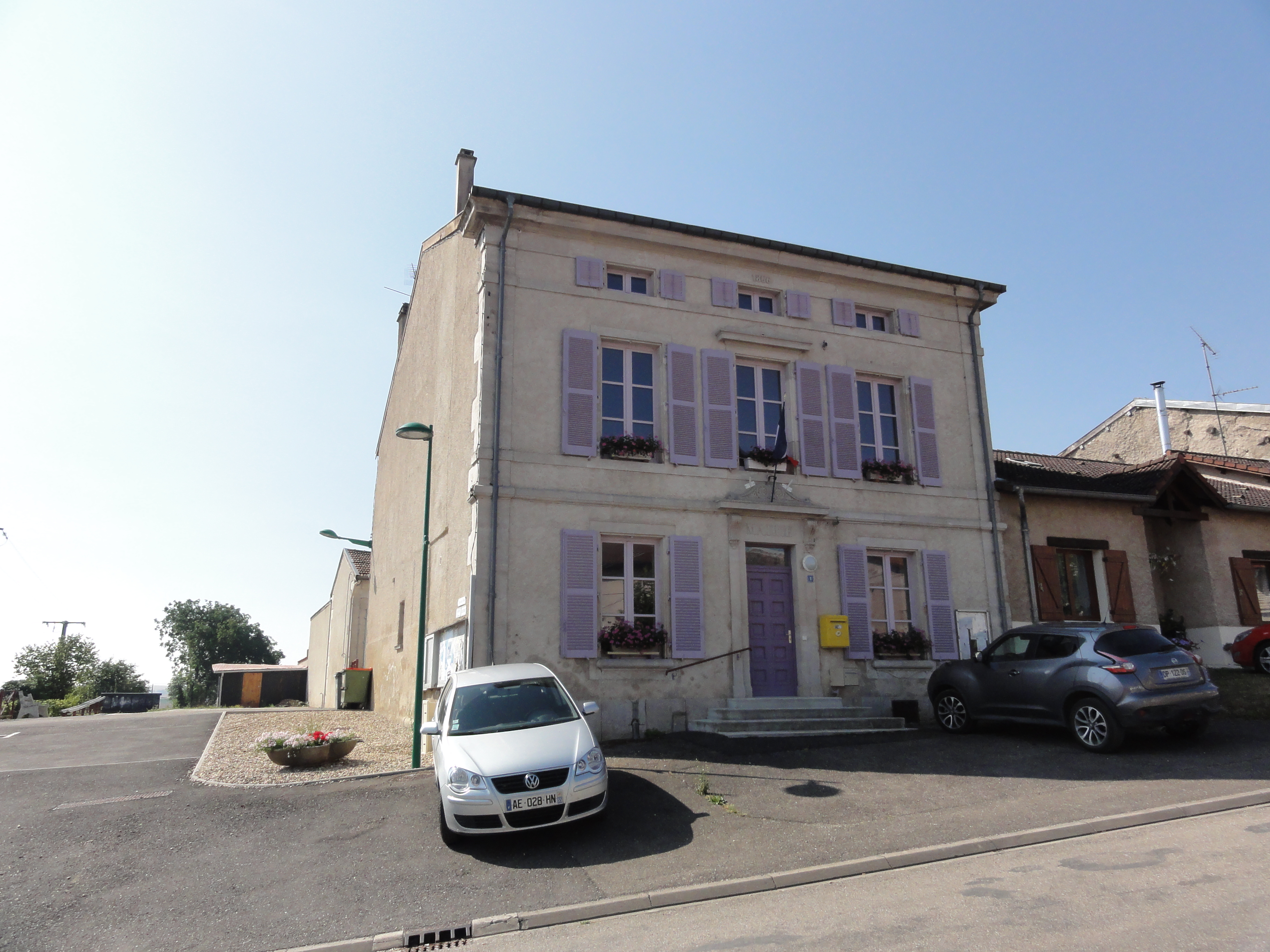 Bouquemont (Meuse) mairie